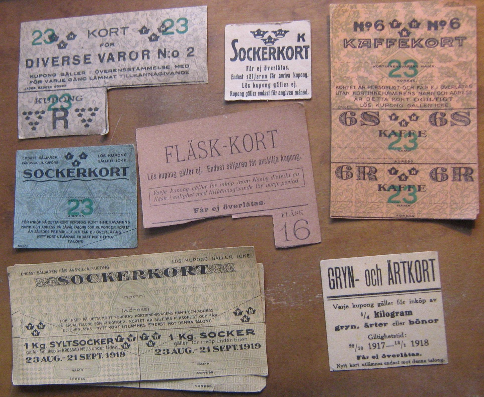 Svenska ransoneringskuponger, första världskriget